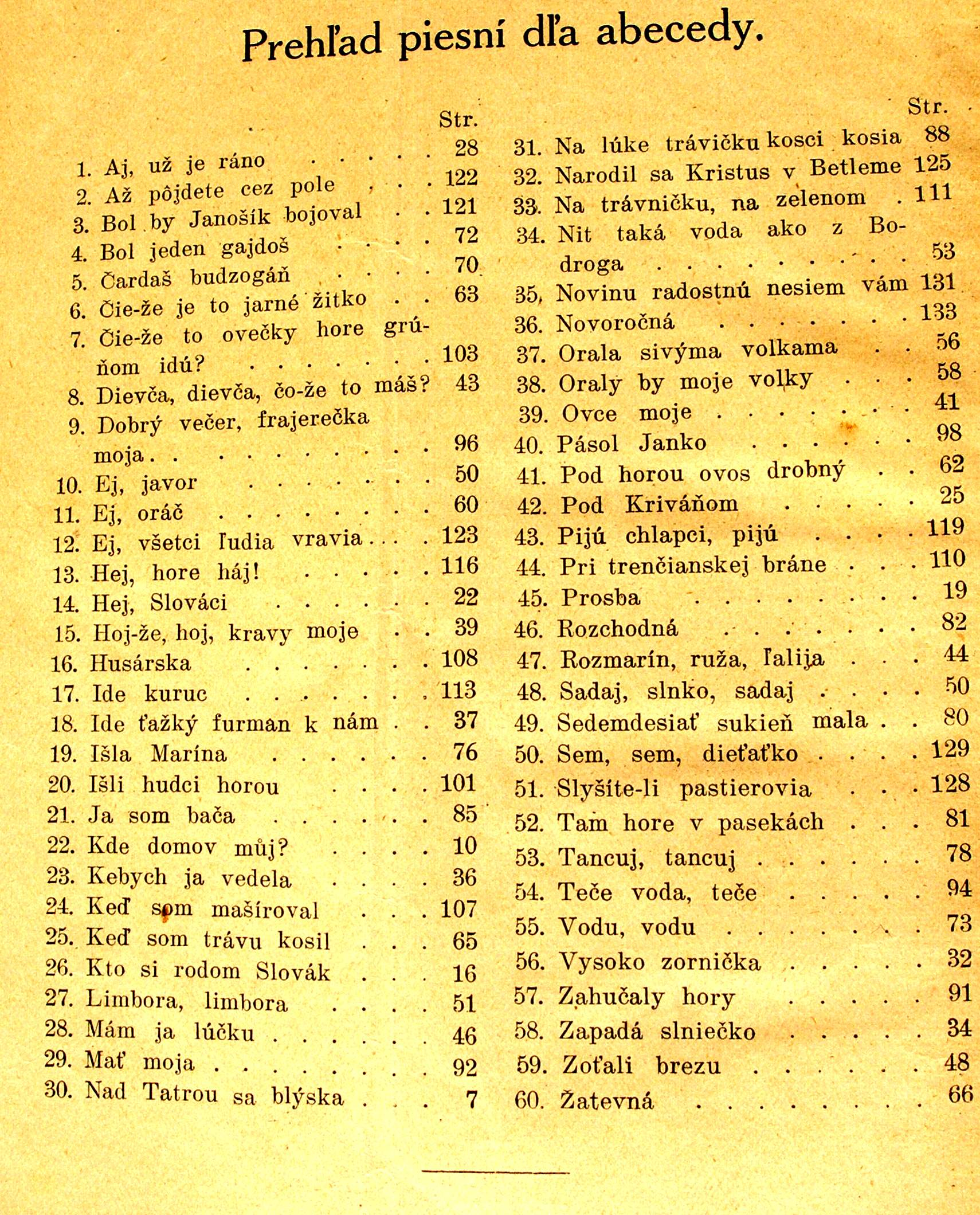 reprodukcia z učebnice Emil Hula: Slovenské kvety, rok vydania 1923